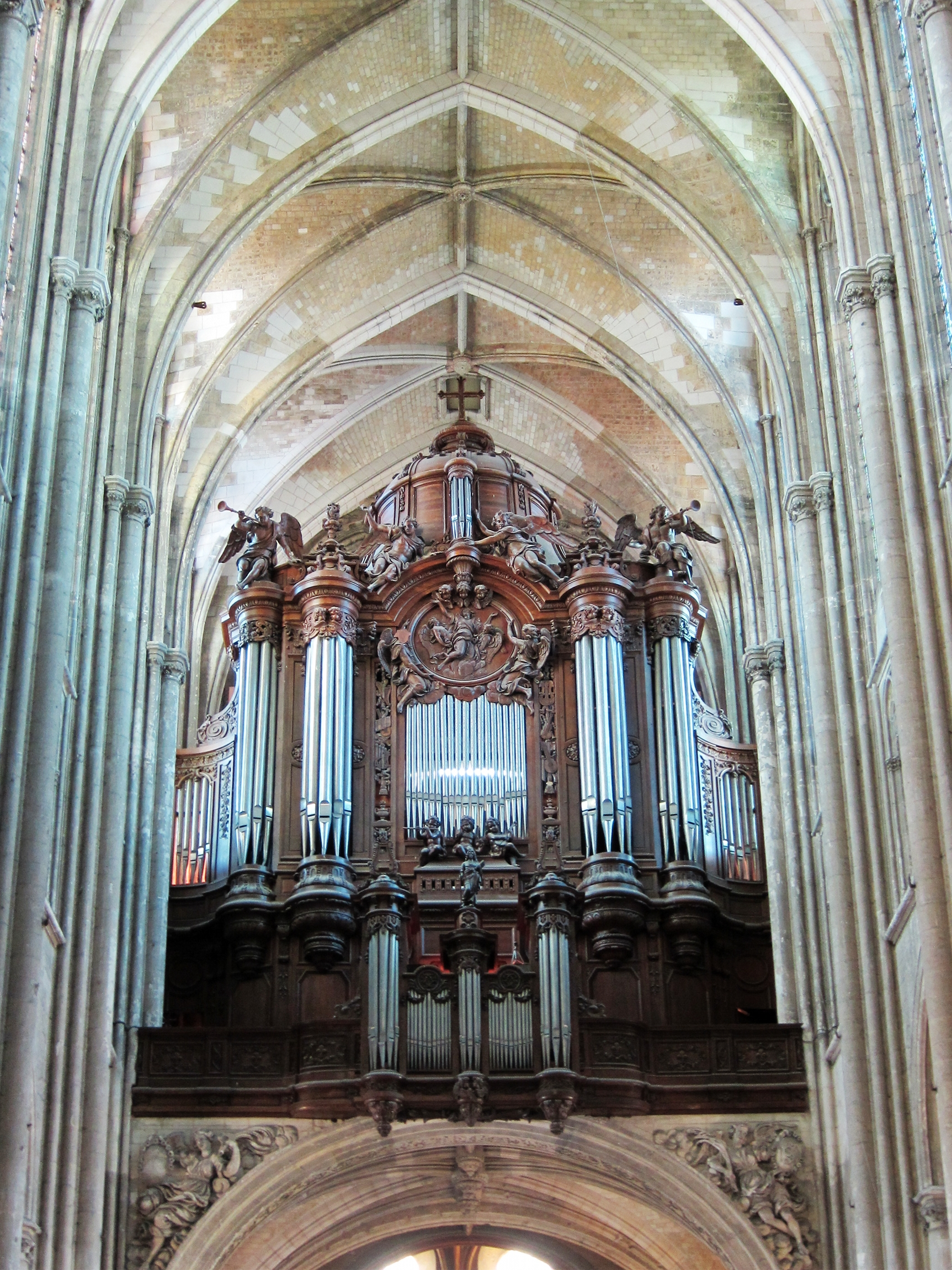 L'orgue de la Basilique Saint-Quentin de Saint-Quentin (Aisne): Buffet de 1699 dessiné par le dessinateur du Roi Jean Bérain et érigé par le menuisier du Roi Pierre Vaideau, classé Monument historique depuis le 27-03-1969.